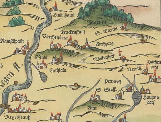 Ausschnitt aus der Bairischen Landtafel von 1568